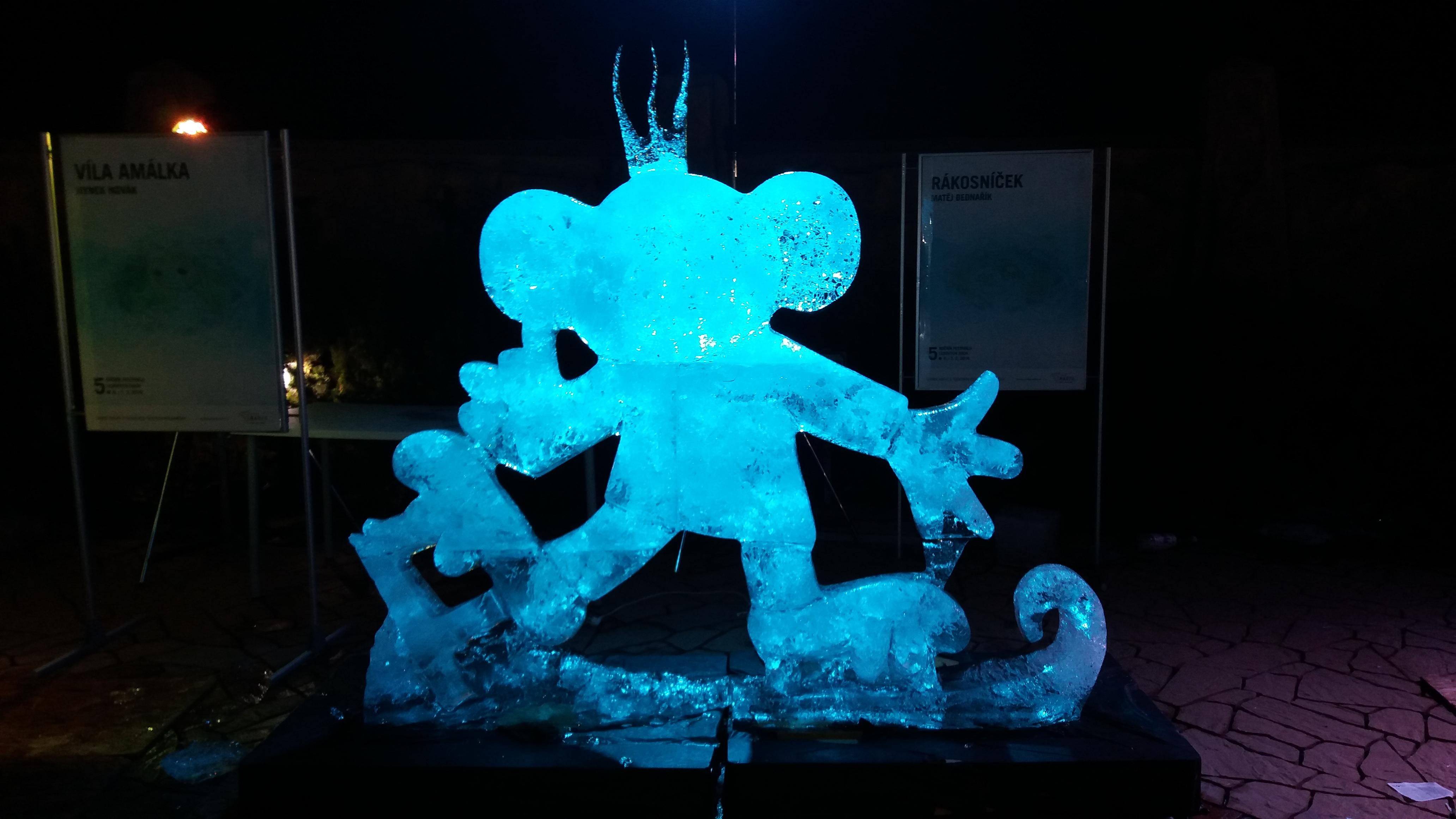 Postavička Rákosníčka vytvořená z ledu na Festivalu ledových soch na střeše pražského nákupního centra Galerie Harfa.